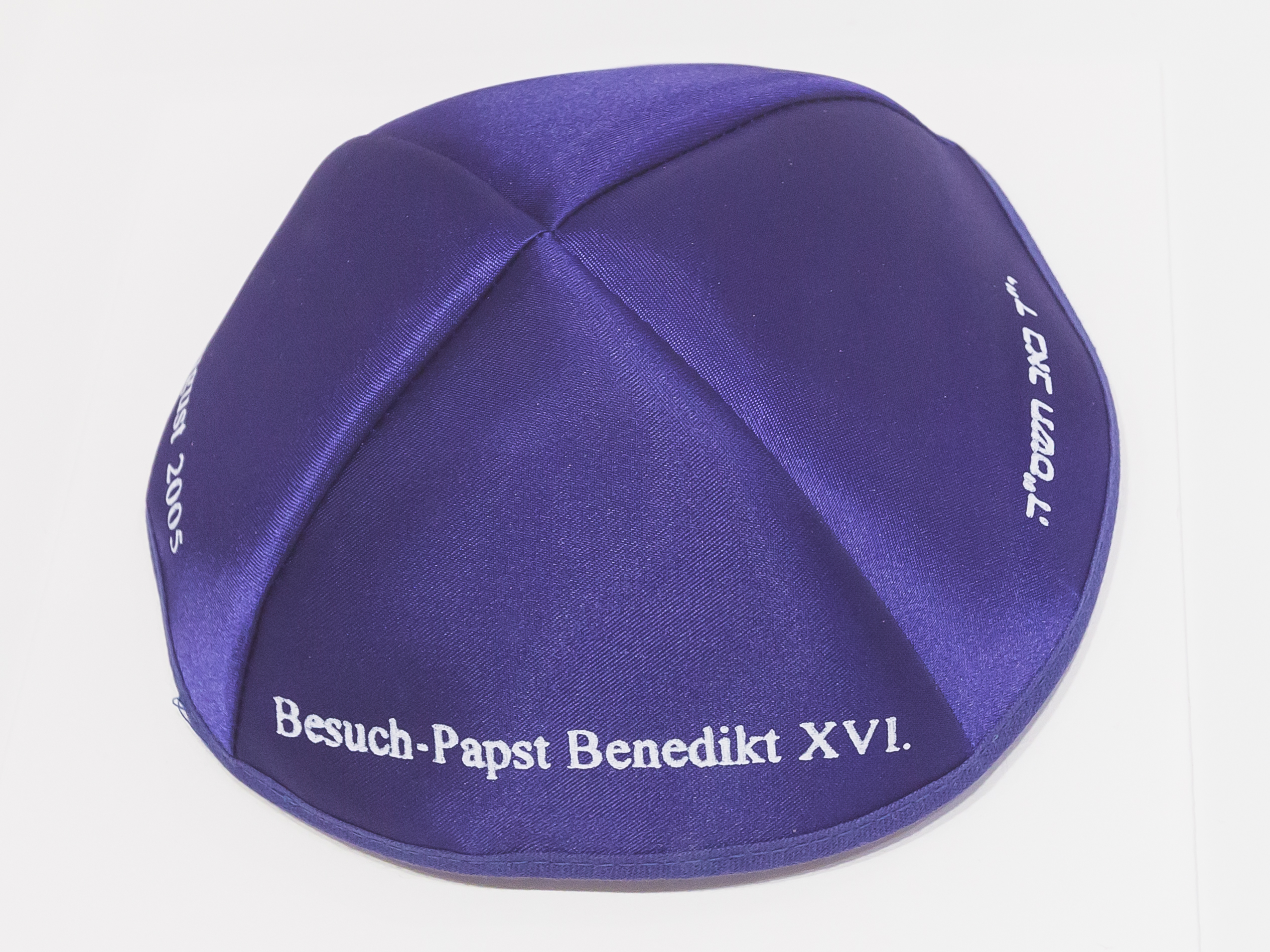 Ausstellungseröffnung „Hilliges Köln 2.0 – Auf dem Weg zur religiösen Toleranz“. Foto: Diese Kippa trugen anwesende Männer beim Besuch des Papstes in der Synagoge an der Roonstraße anlässlich des Weltjugendtages in Köln. Leihgabe des Kölnischen Stadtmuseums (Inv.-Nr. 2005/168)